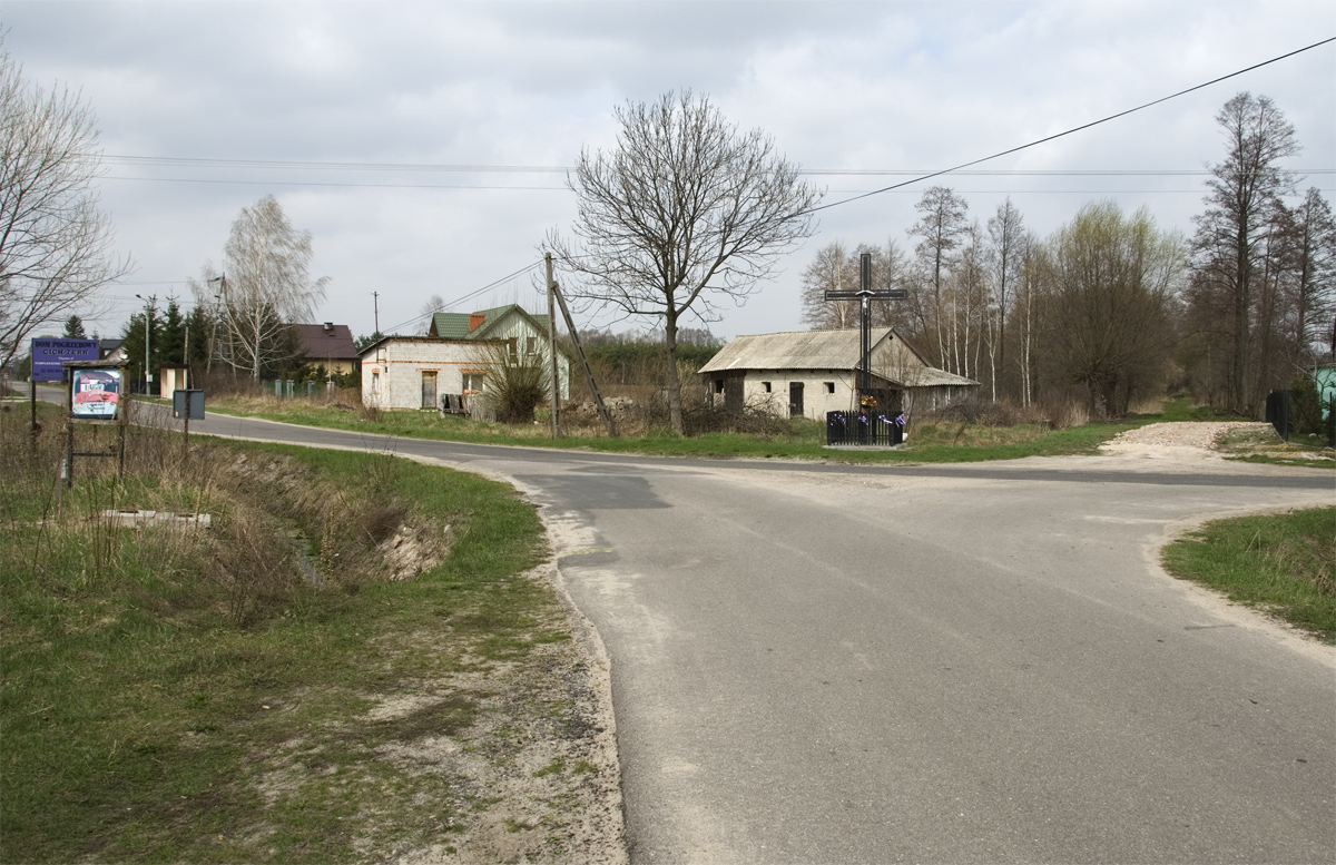 Biały Ług